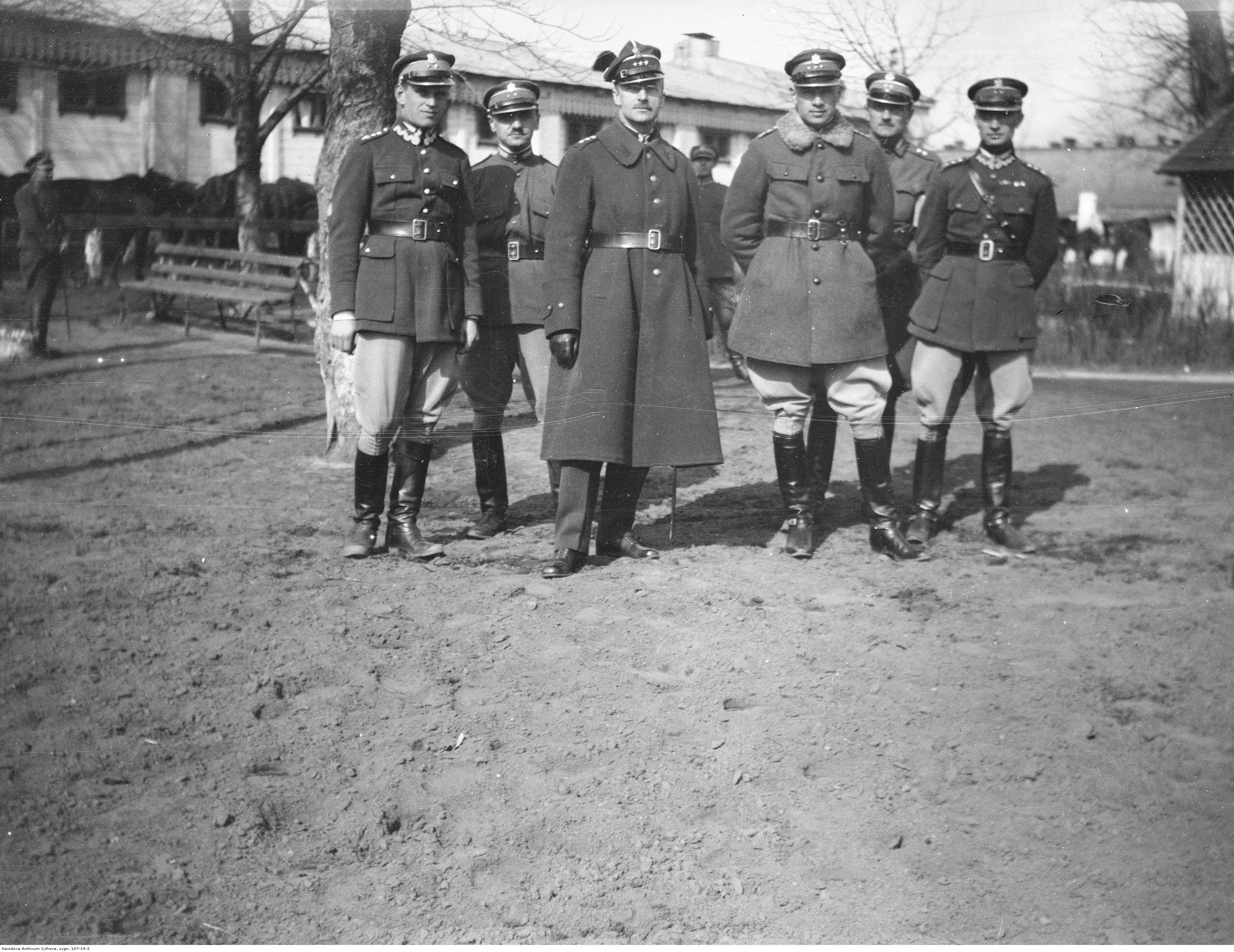 Grupa oficerów - stoją od lewej: por. Kazimierz Pereświet-Sołtan, por. Józef Makowiecki, rtm. Ksawery Pusłowski, rtm. Adam Radomyski, por. Stanisław Mirowski, por. Józef Szostak.